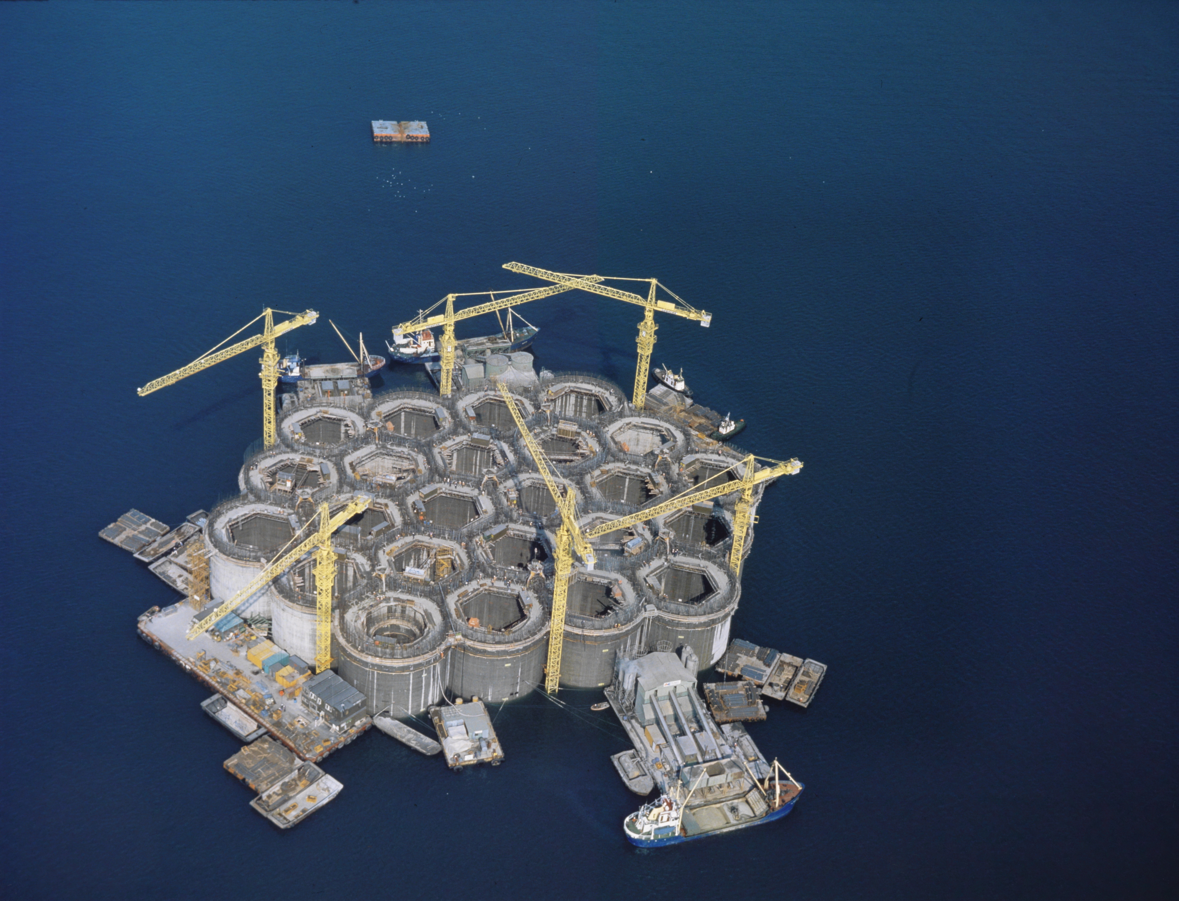 Betongfundament til Statfjord B under bygging.